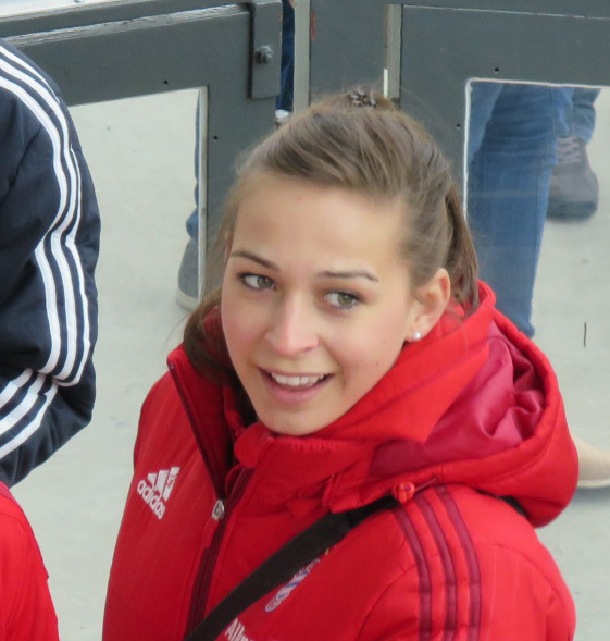 Sarah Romert, February 2016